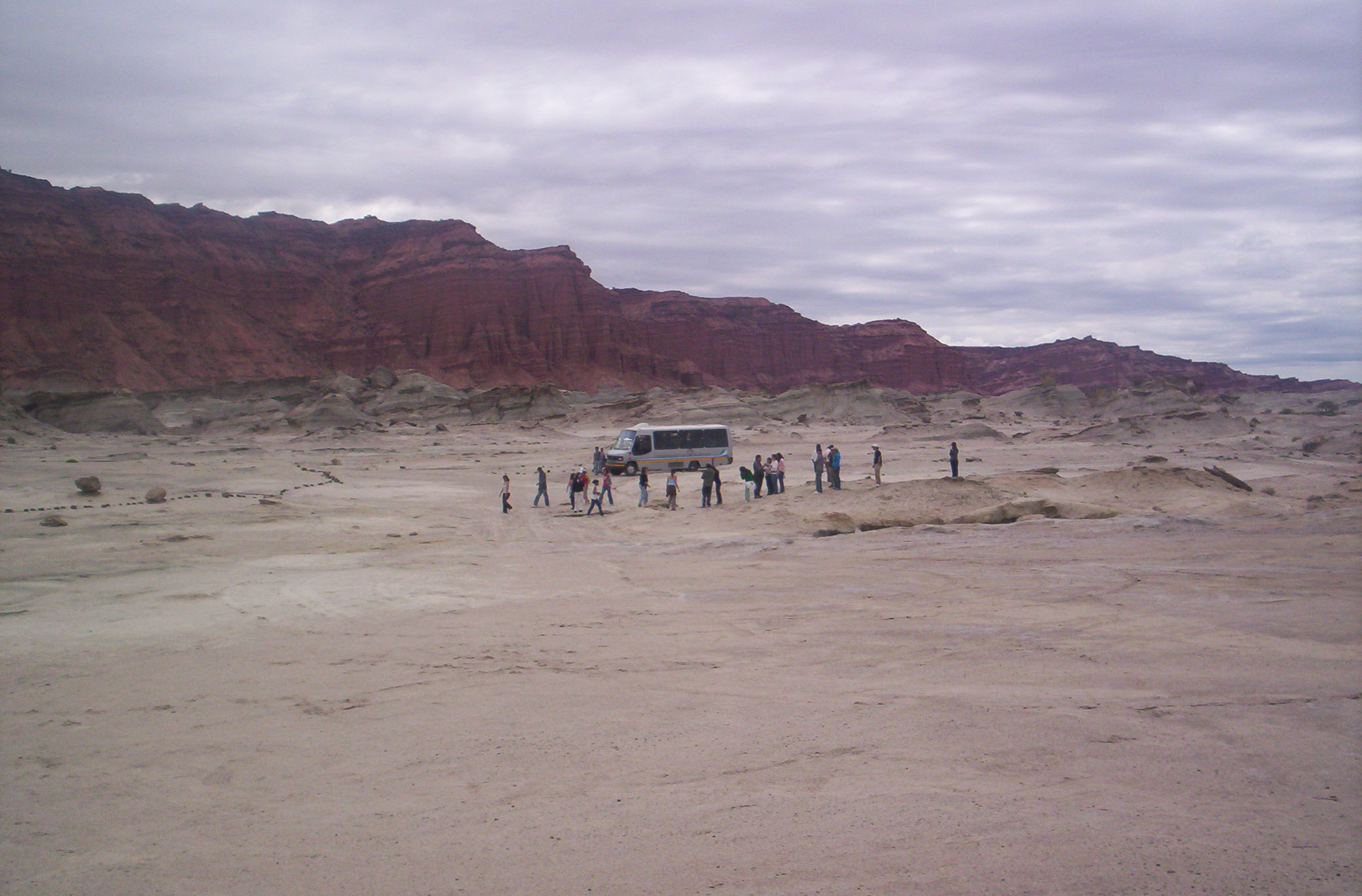 Parque provincial Ischigualasto, provincia de San Juan, Argentina